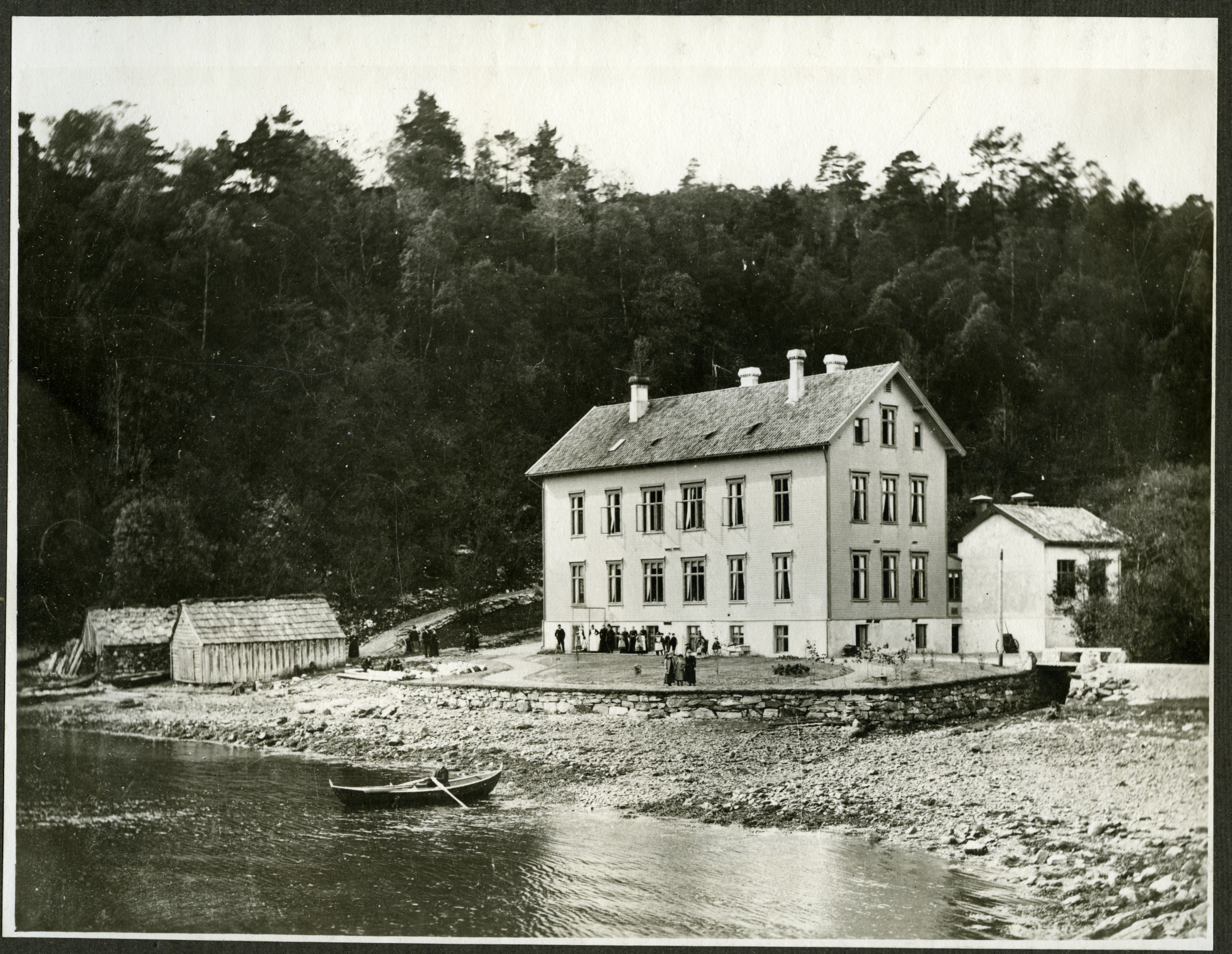 Bildet er hentet fra Arkivverket. Kysthospitalet i Hagevik 1893. Arkivinstitusjon : Riksarkivet Arkivnavn : Medisinaldirektøren, Overlegen for tuberkulosen/Ktr. for lege- og sunnhetsvesen, tuberkulosesaker Sted : Norge, Hordaland, Os, Emneord: Sykehus, Tuberkulose Avbildet